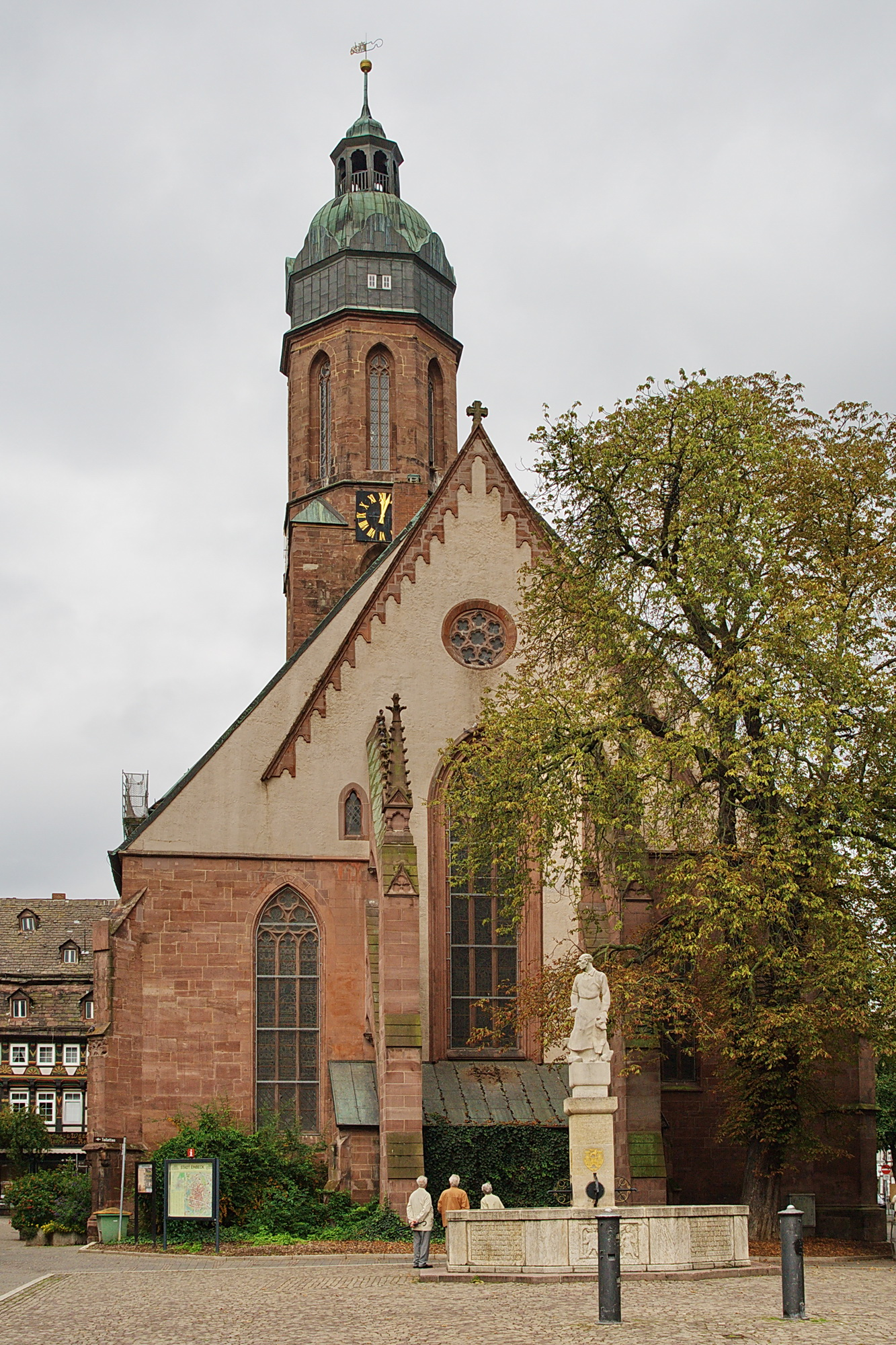 Marktkirche St.Jacobi in Einbeck, Niedersachsen, Deutschland